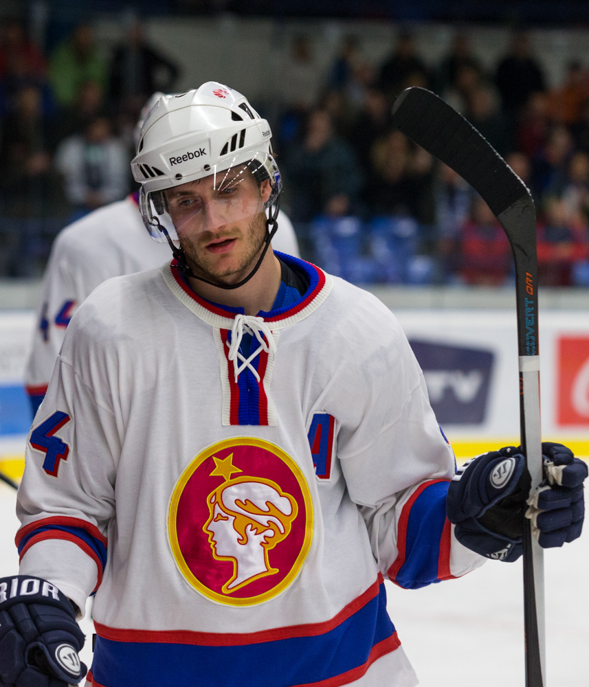 1. liga - 13.12.2014 16:00 CET - Round 34 Rytíři Kladno 4:0 (2:0, 1:0, 1:0) HC Dukla Jihlava